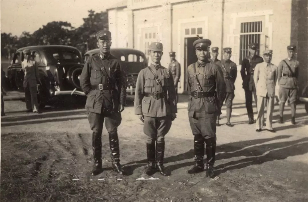 陈诚和李宗仁、白崇禧合影于广西南宁。